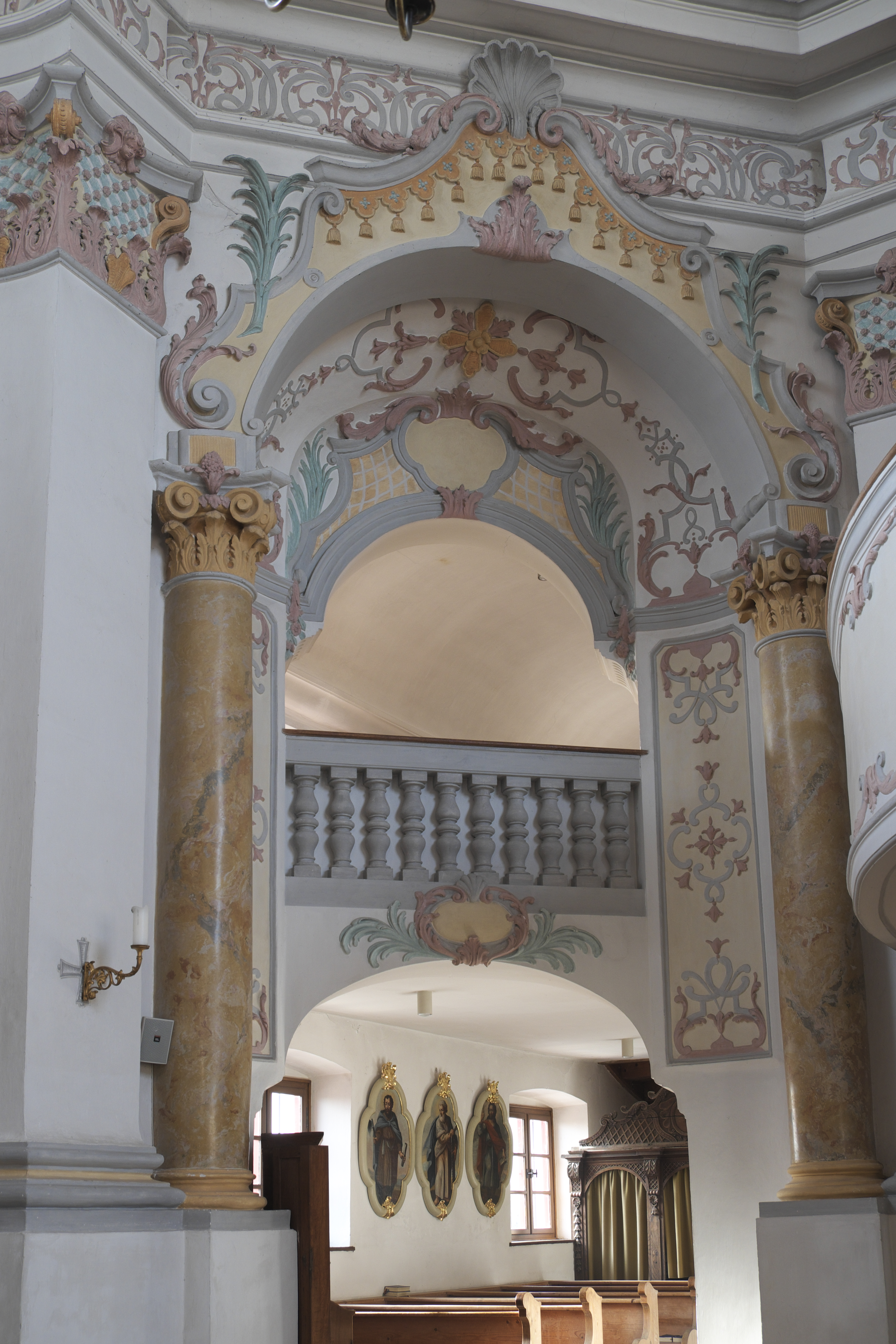 Katholische Pfarrkirche St. Johannes Baptist in Bergkirchen im Landkreis Dachau (Bayern/Deutschland), Beichtkapelle